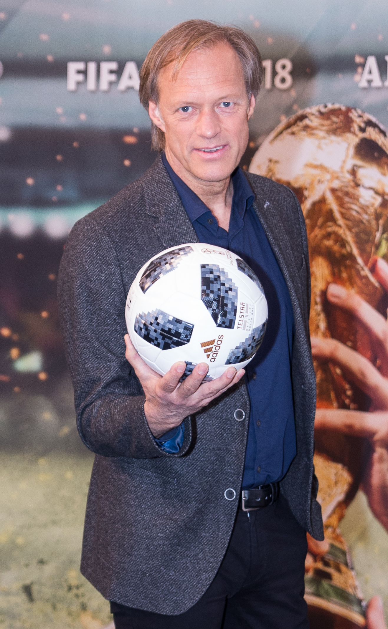 Gerhard Delling, Reporter und Moderator der ARD